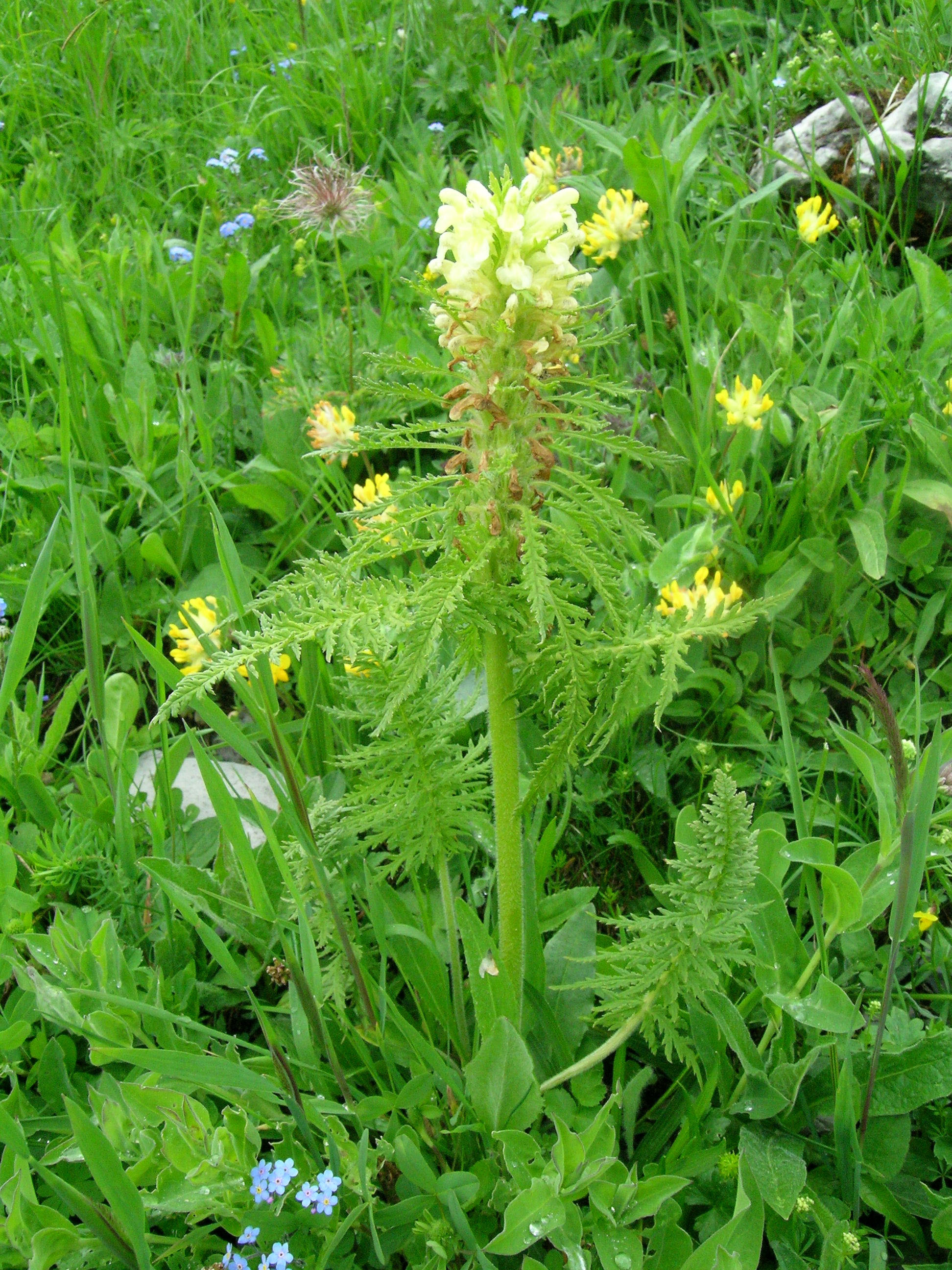 Pedicularis hacquetii, Schynige Platte, Kanton Bern, Schweiz